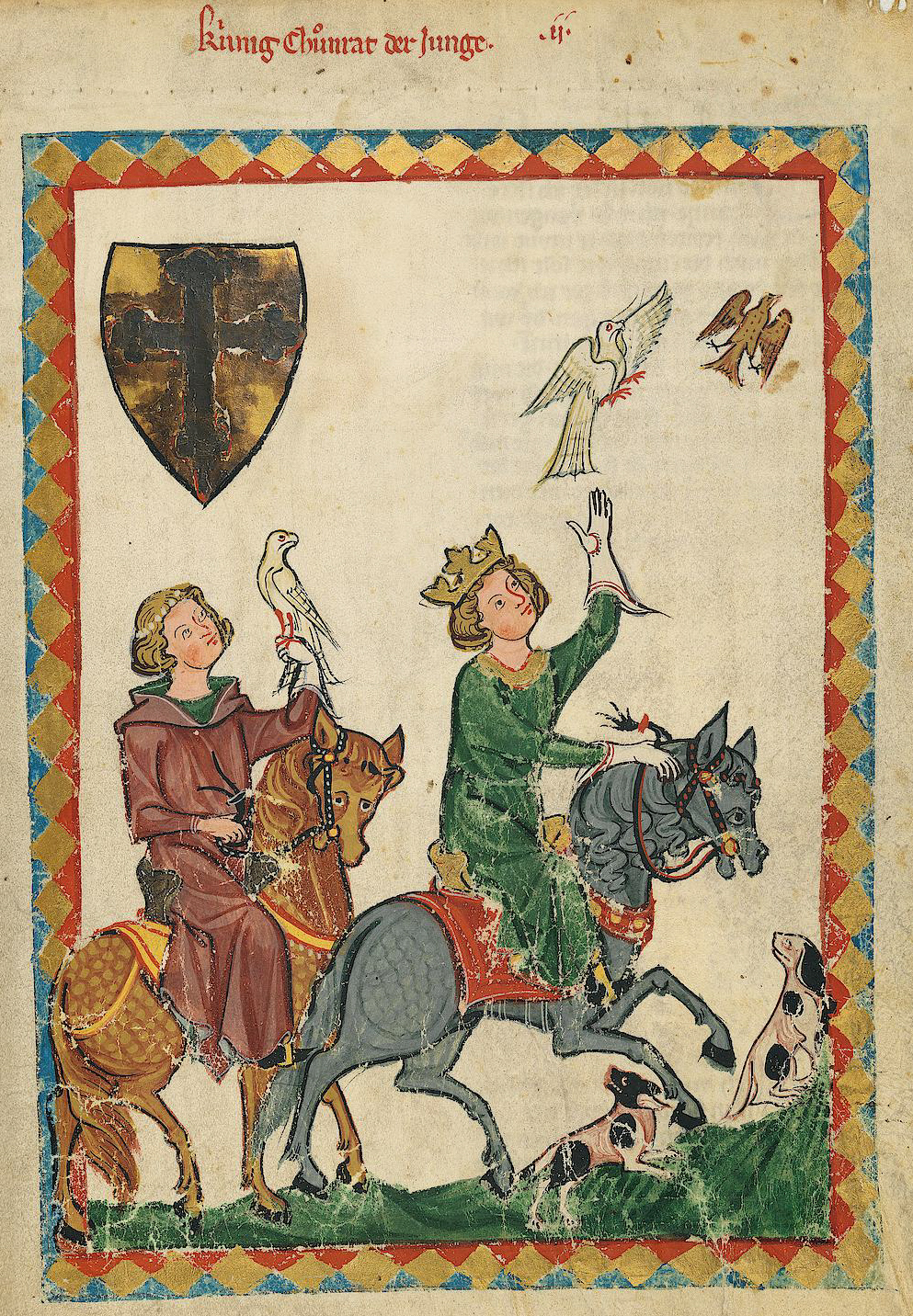 Codex Manesse, fol. 7r, Konradin von Hohenstaufen ("König Konradin der Junge")